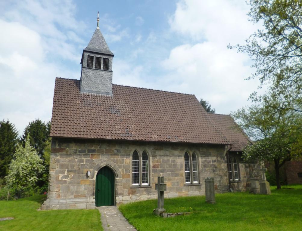 Jacobikirche in Bäntorf